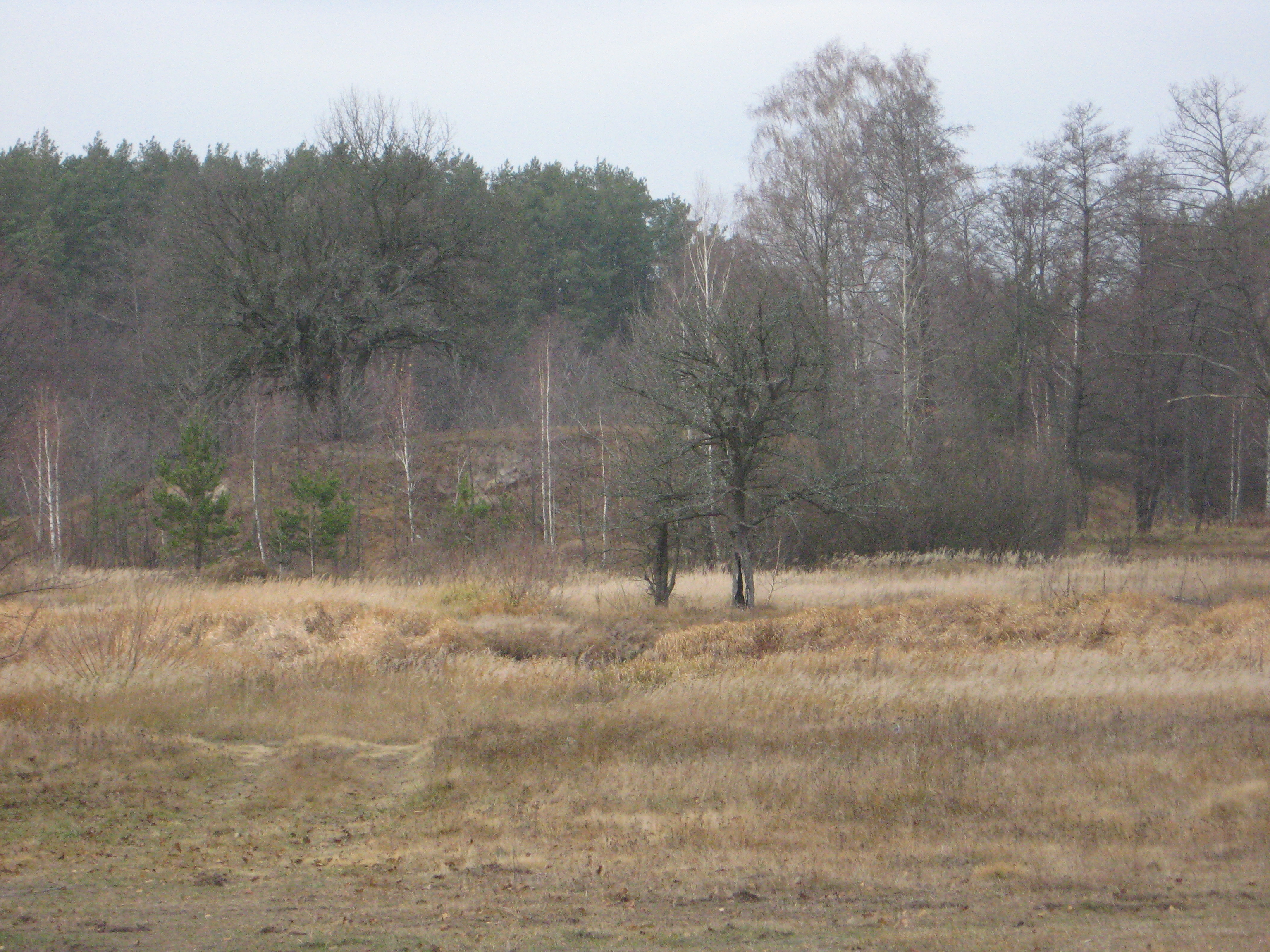 Змієві вали в Коростенському районі